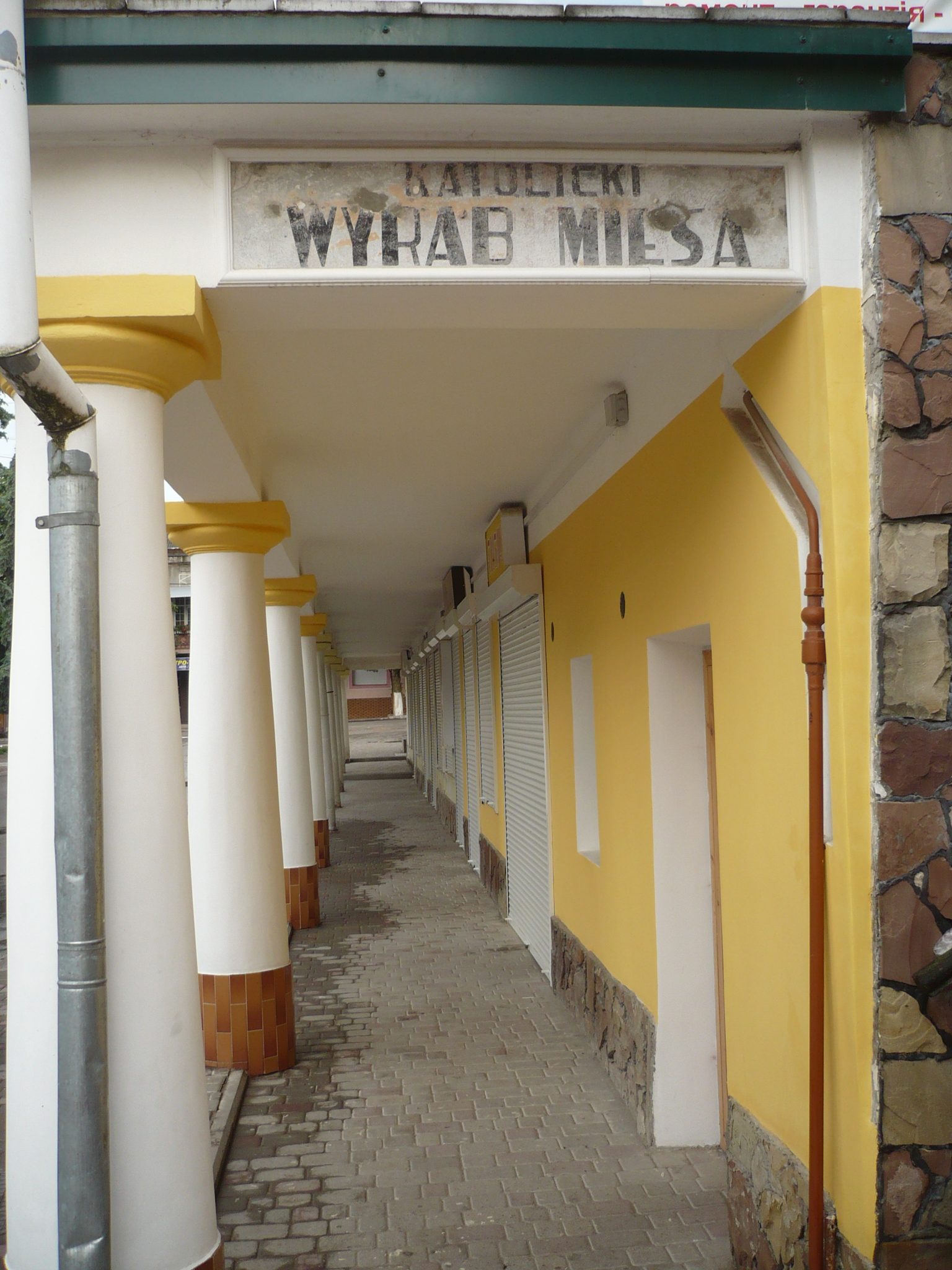 Czortków.Jatki